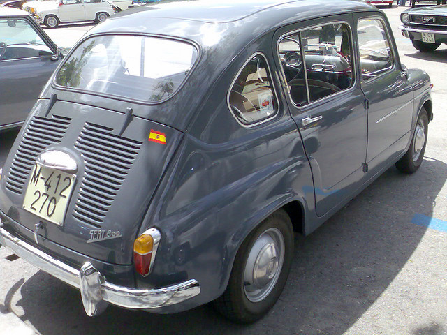 SEAT 800Sedán. 1966~ 5MAD033 madrid SANTIAGO BERNABEU DOS DE MAYO